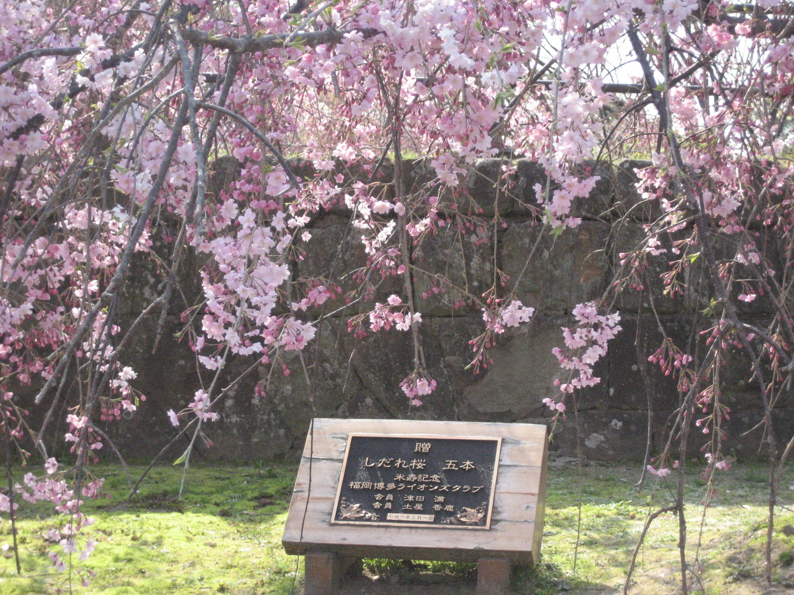 Shidare_sakura_flowers in Ohori Park, Fukuoka, Japan